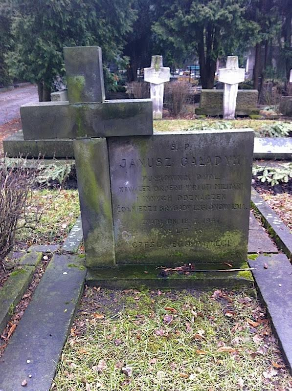 zdjęcie nagrobka Janusz Gaładyka